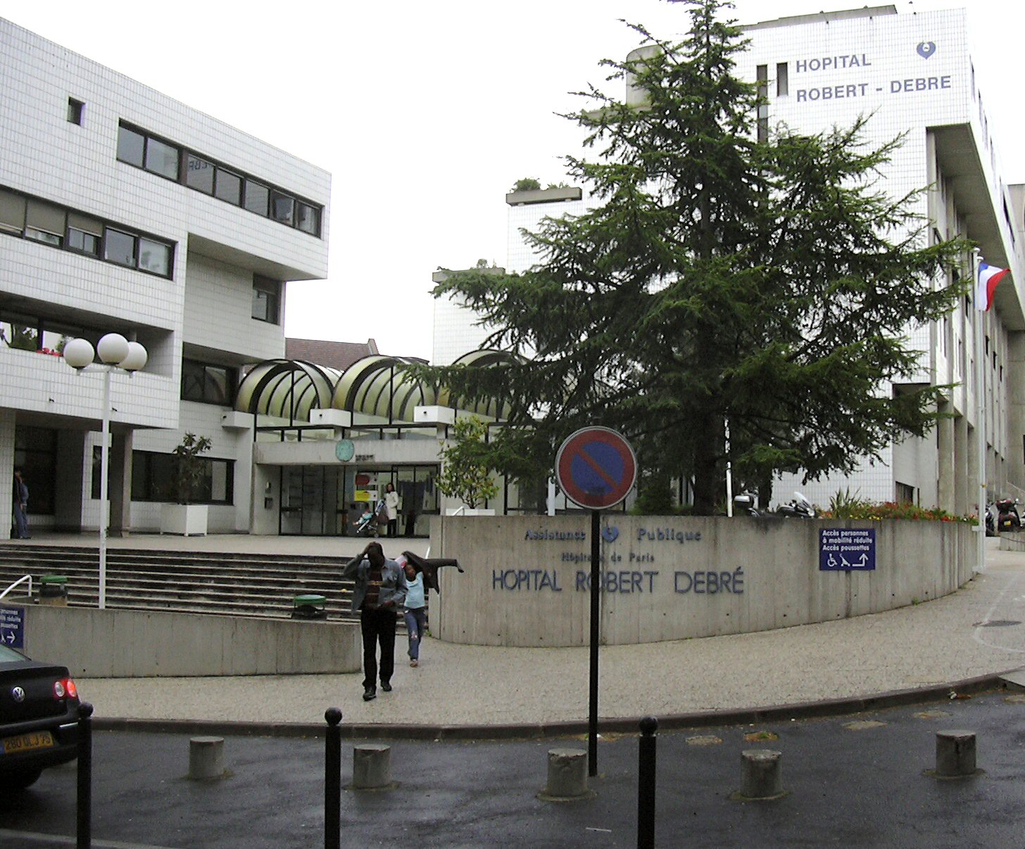 hopital debre paris france